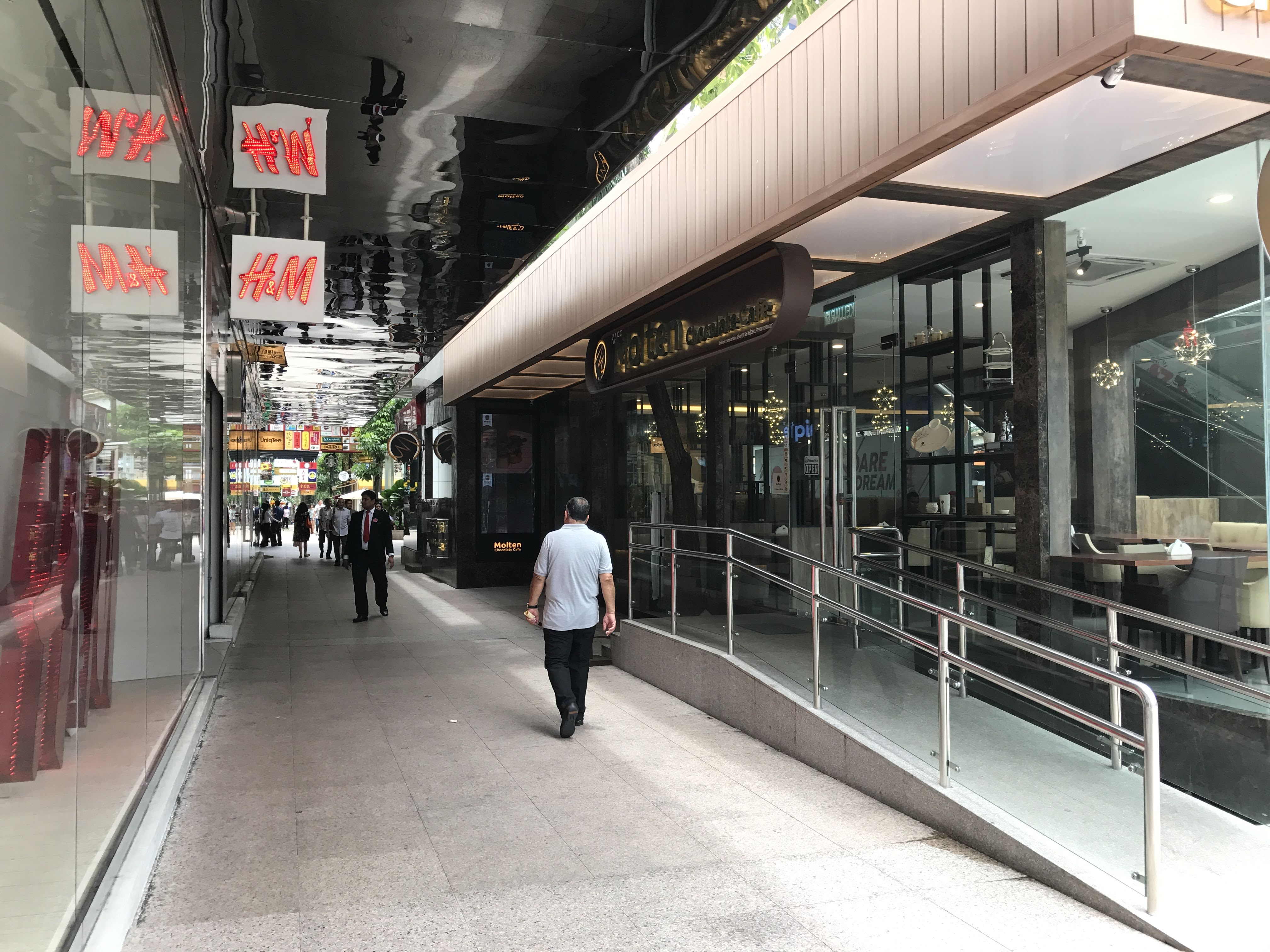 吉隆坡樂天廣場外部